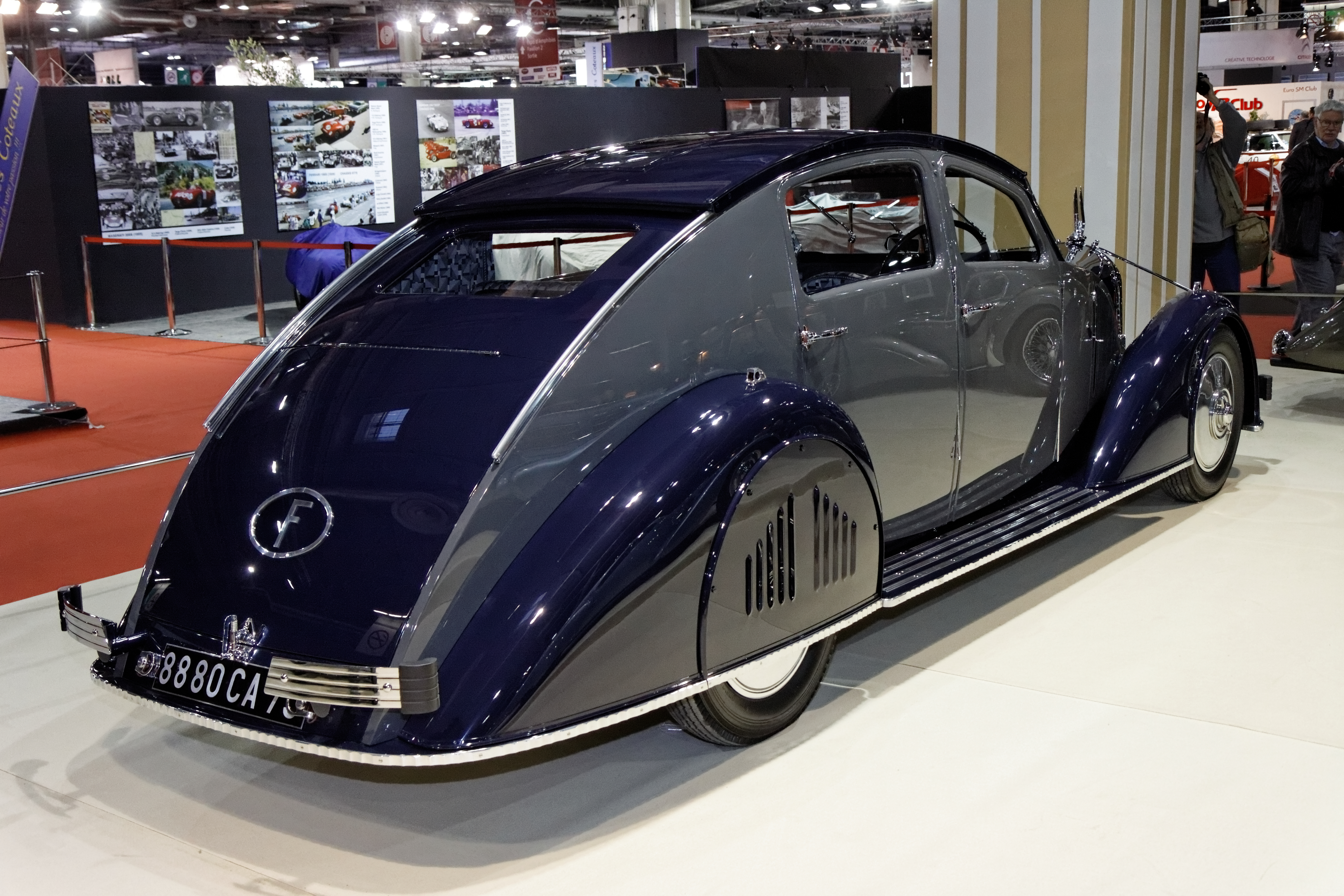 Voisin type C25 aérodyne